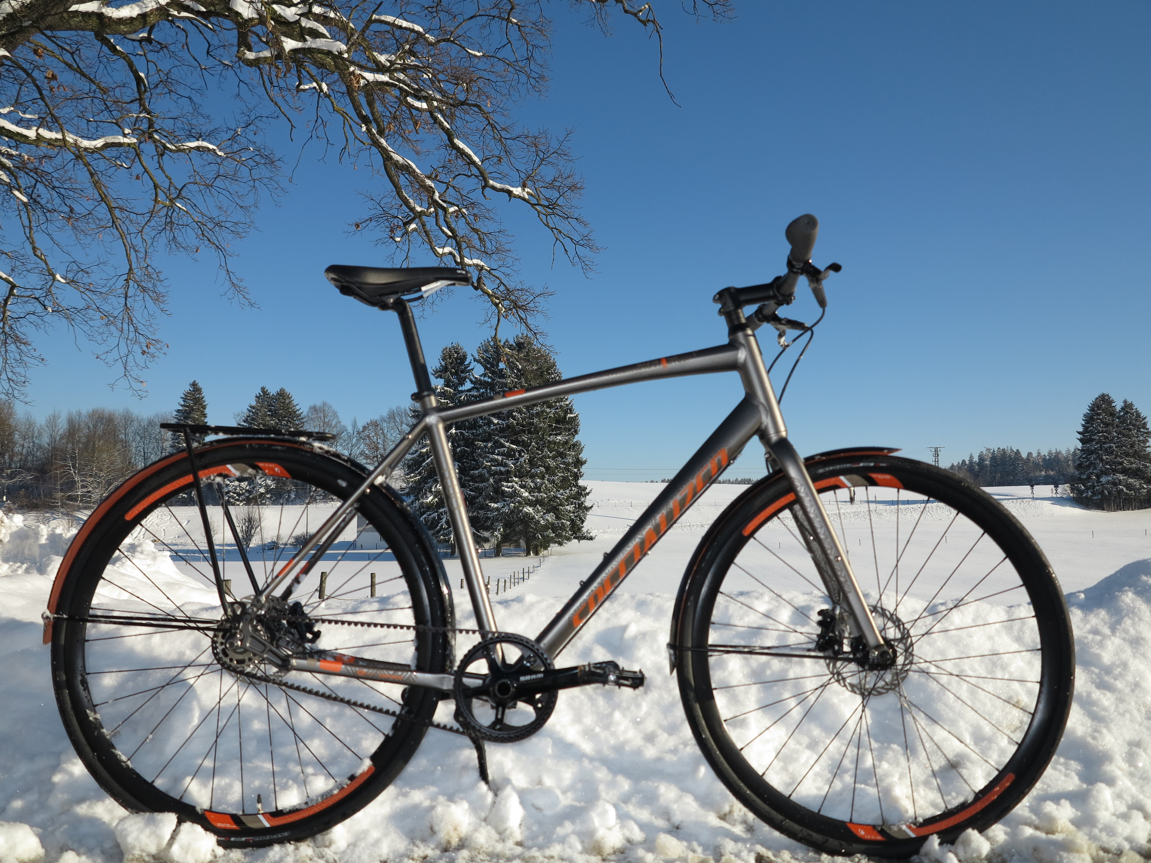 Fitnessrad limitierter Auflage für die Straße. Besonderheit: Riemenantrieb von SRAM mit Automatix Nabenschaltung. Für jedes verkaufte Modell spendet Specialized ein - speziell für diesen wohltätigen Zweck designtes - Rad an die World Bicycle Relief. Die Räder sollen den in Afrika stationierte Helfern dieser Organisation den Transport erleichtern.